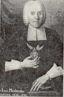 Obraz Jana Leopolda Mosbendra